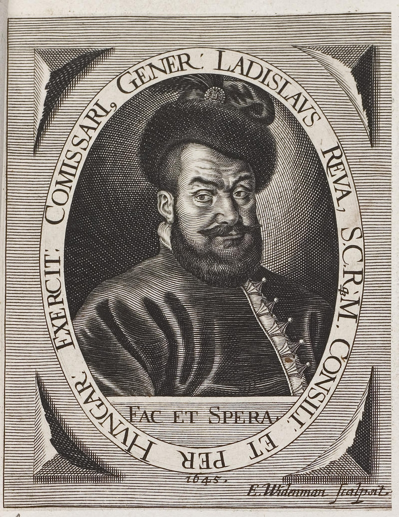 Grafik aus dem Klebeband Nr. 2 der Fürstlich Waldeckschen Hofbibliothek Arolsen Motiv: Ladislav Révai (1600–1660), Kaiserl. Rat und Generalheereskommissar in Ungarn